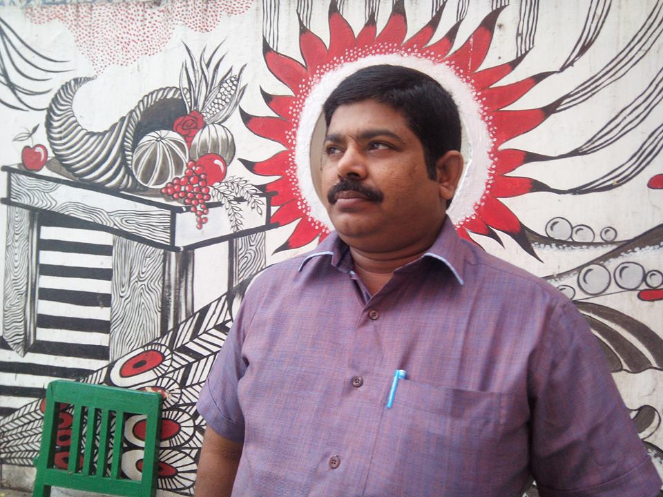 కలిదిండి వర్మ